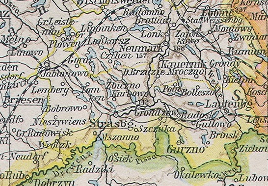 Kreis Strasburg in Westpreußen, Ausschnitt aus File:Ost-_und_Westpreussen.jpg